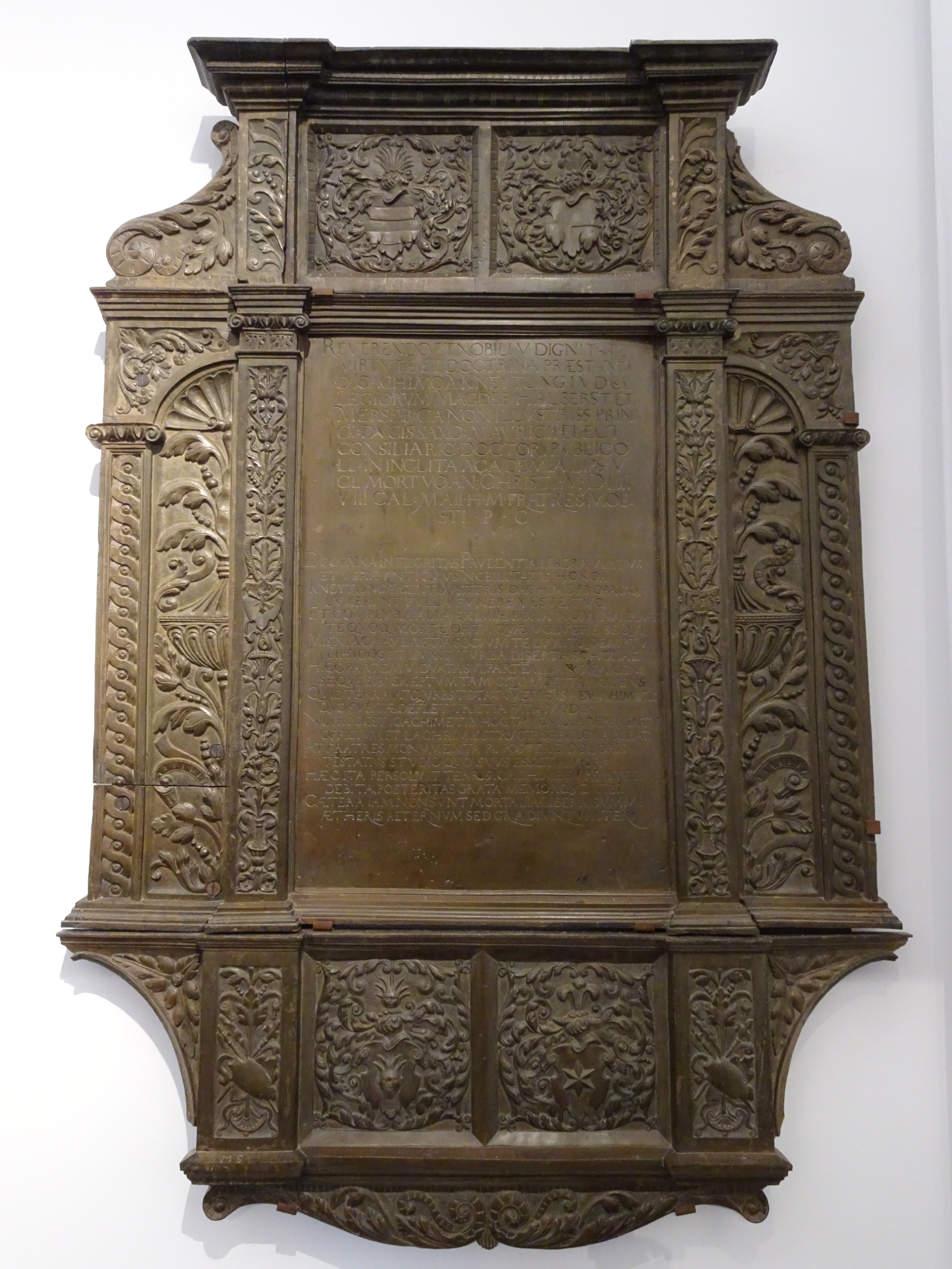 Epitaph des Joachim von Kneitlingen in der Universitätskirche St. Pauli zu Leipzig